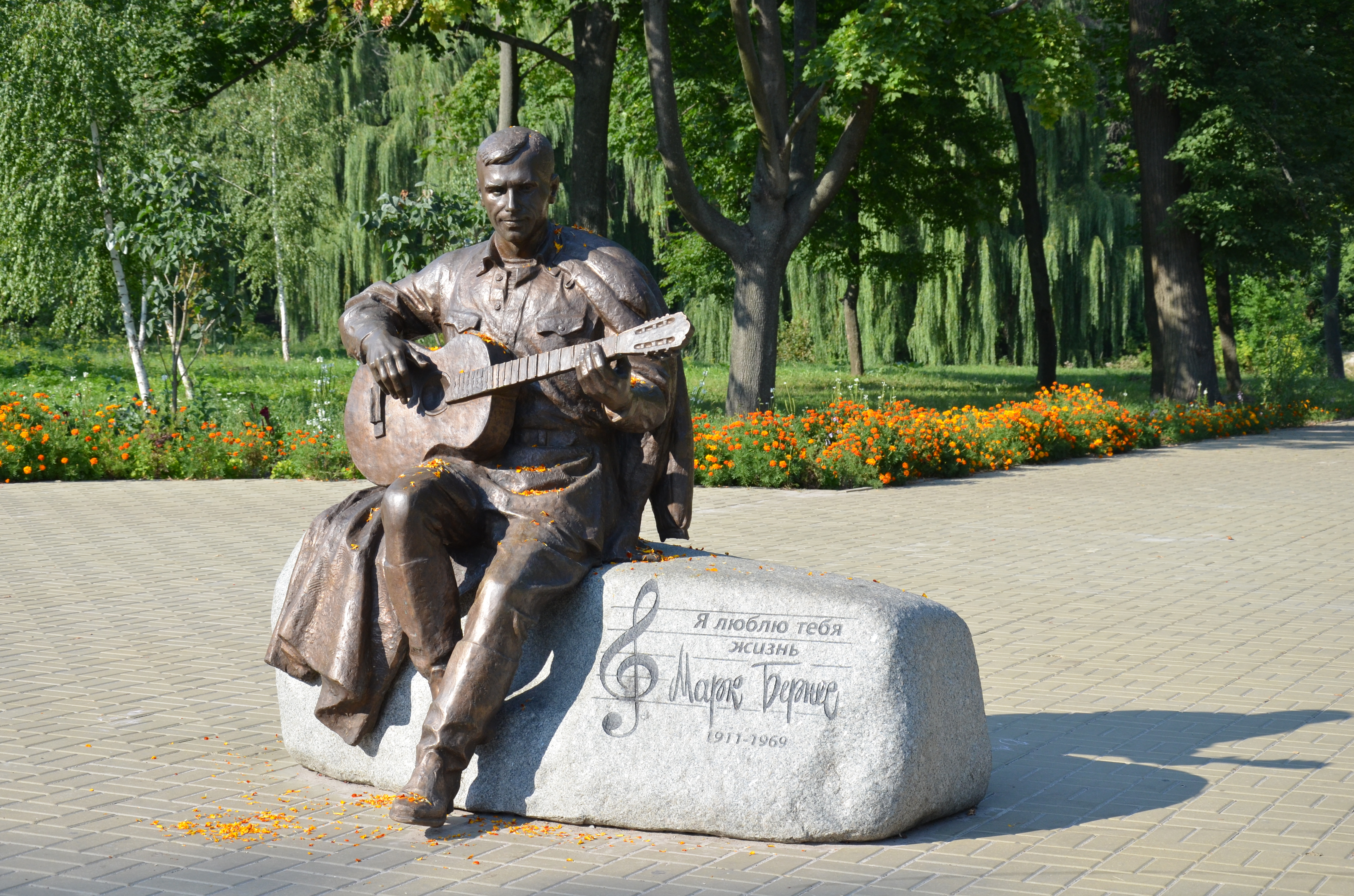 Графський парк (парк Ніжинського педінституту), Ніжинський район, м. Ніжин